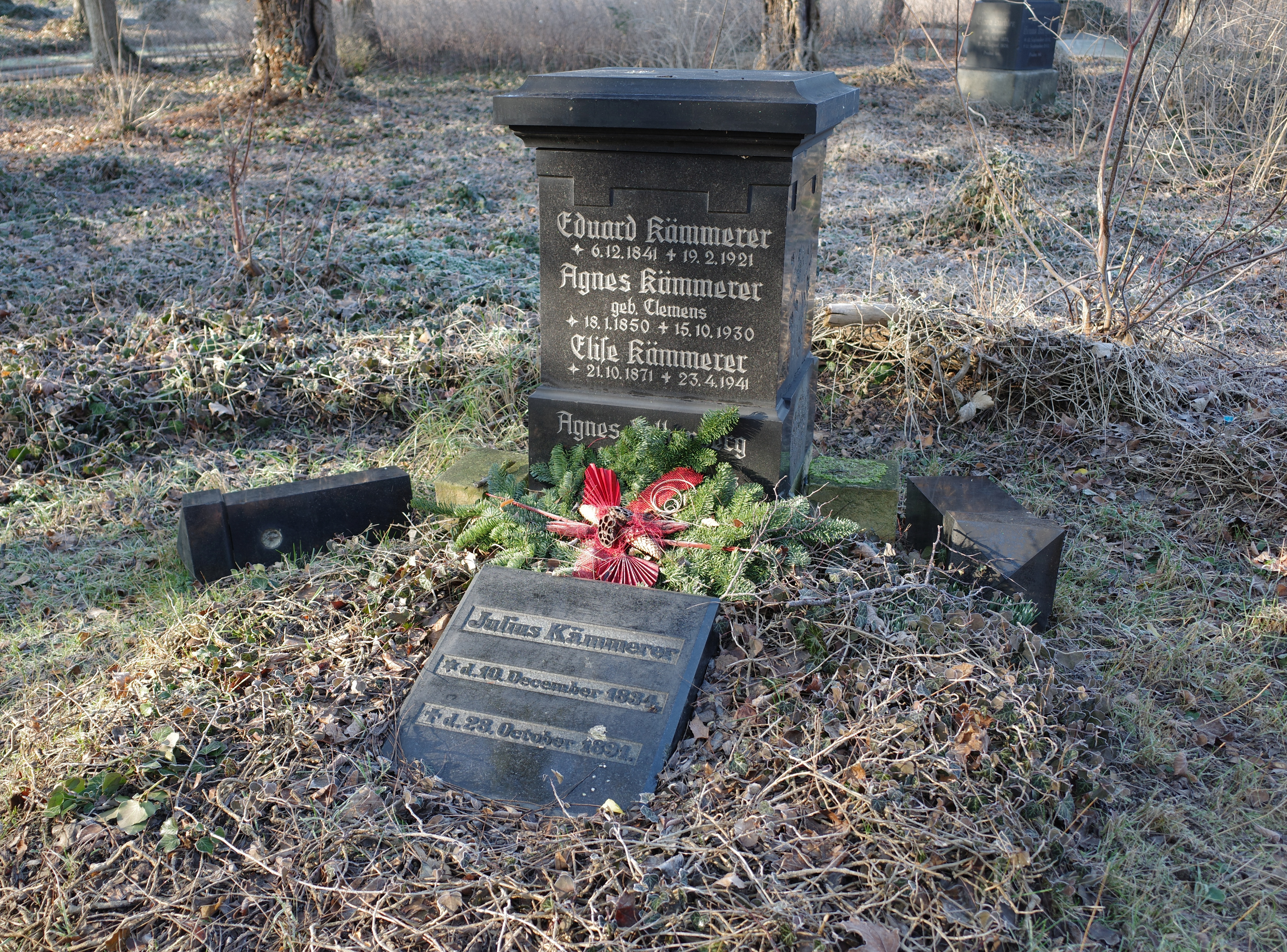 Dessau, Friedhof 3. Ruhestätte von Familie Kämmerer.